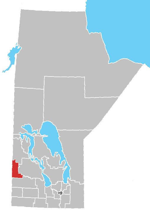 Manitoba census area No. 16